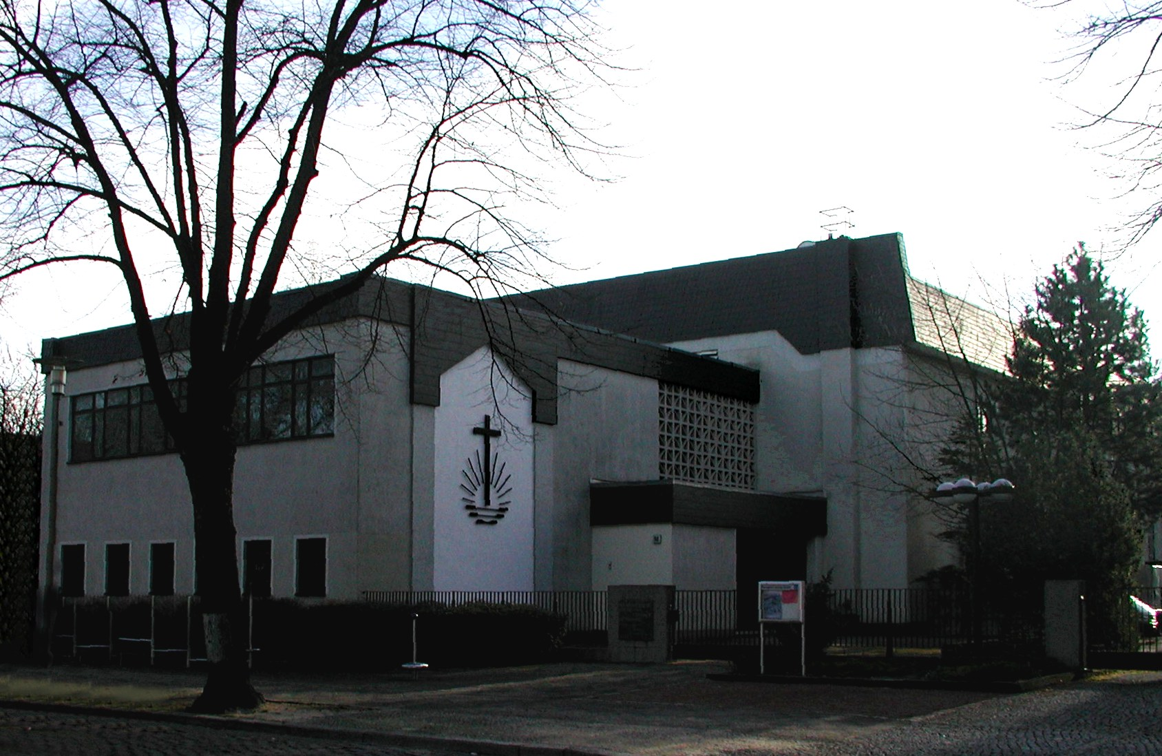 Das Gebäude der Neuapostolischen Kirche in Berlin-Lichtenberg